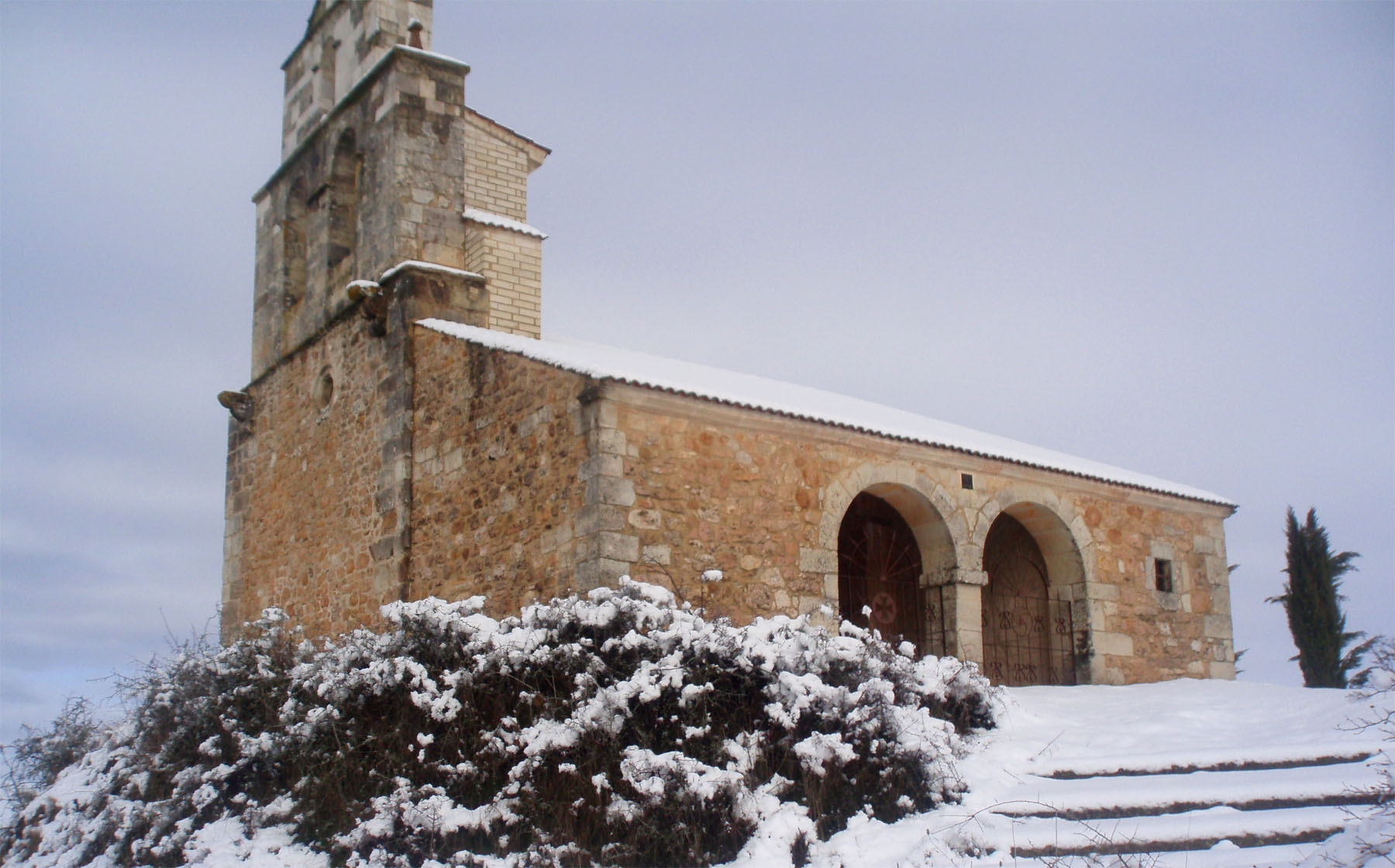 Iglesia románica de San Pelayo en Pisón de Ojeda (Palencia, Castilla y León)